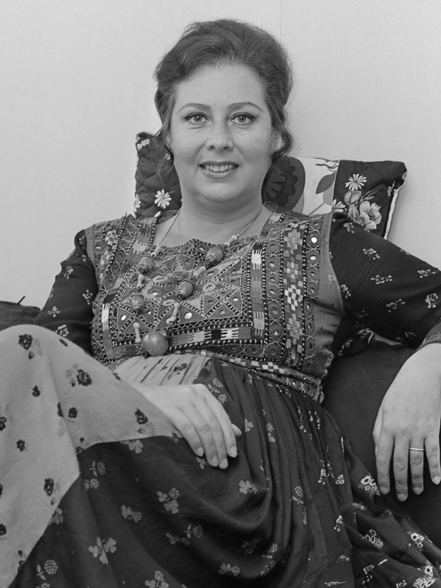 Opdracht Viva, Mimi Kok 16 juli 1974